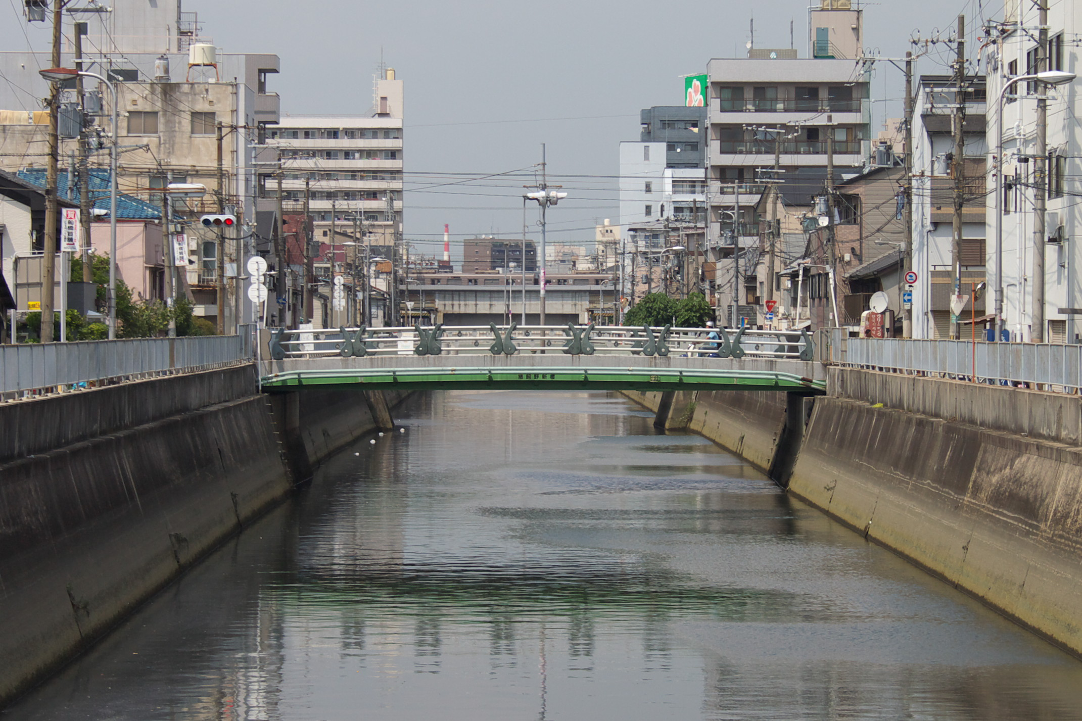 猪飼野新橋（大阪市, 日本）